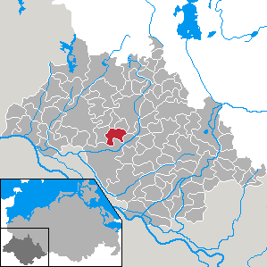 Warlitz in Mecklenburg-Vorpommern - district Ludwigslust